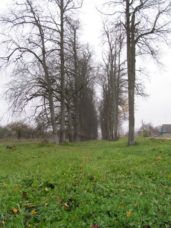 Бярозаўка. Алея